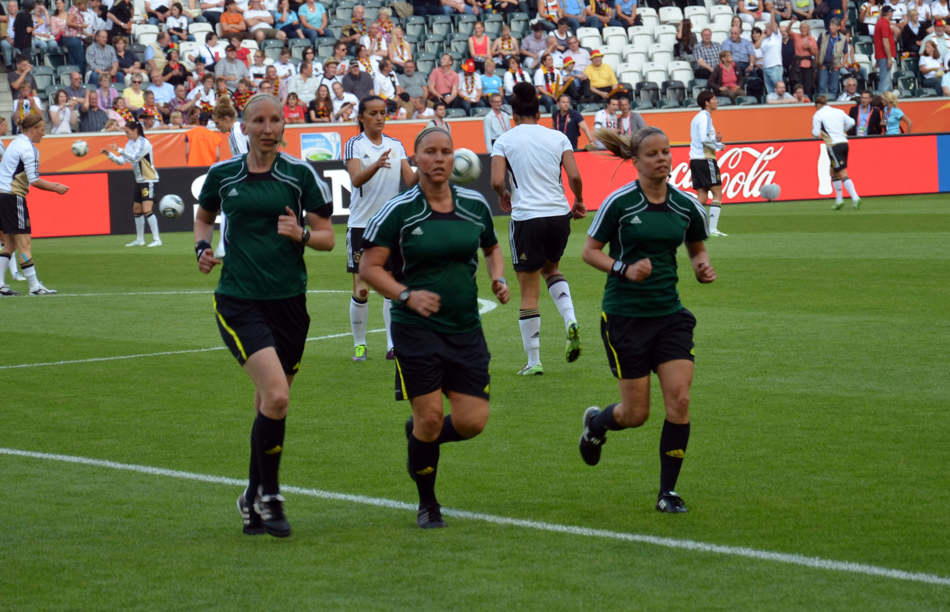 WM Vorrundenspiel zwischen Frankreich und Deutschland am 5. Juli 2011 im Borussiapark in Mönchengladbach